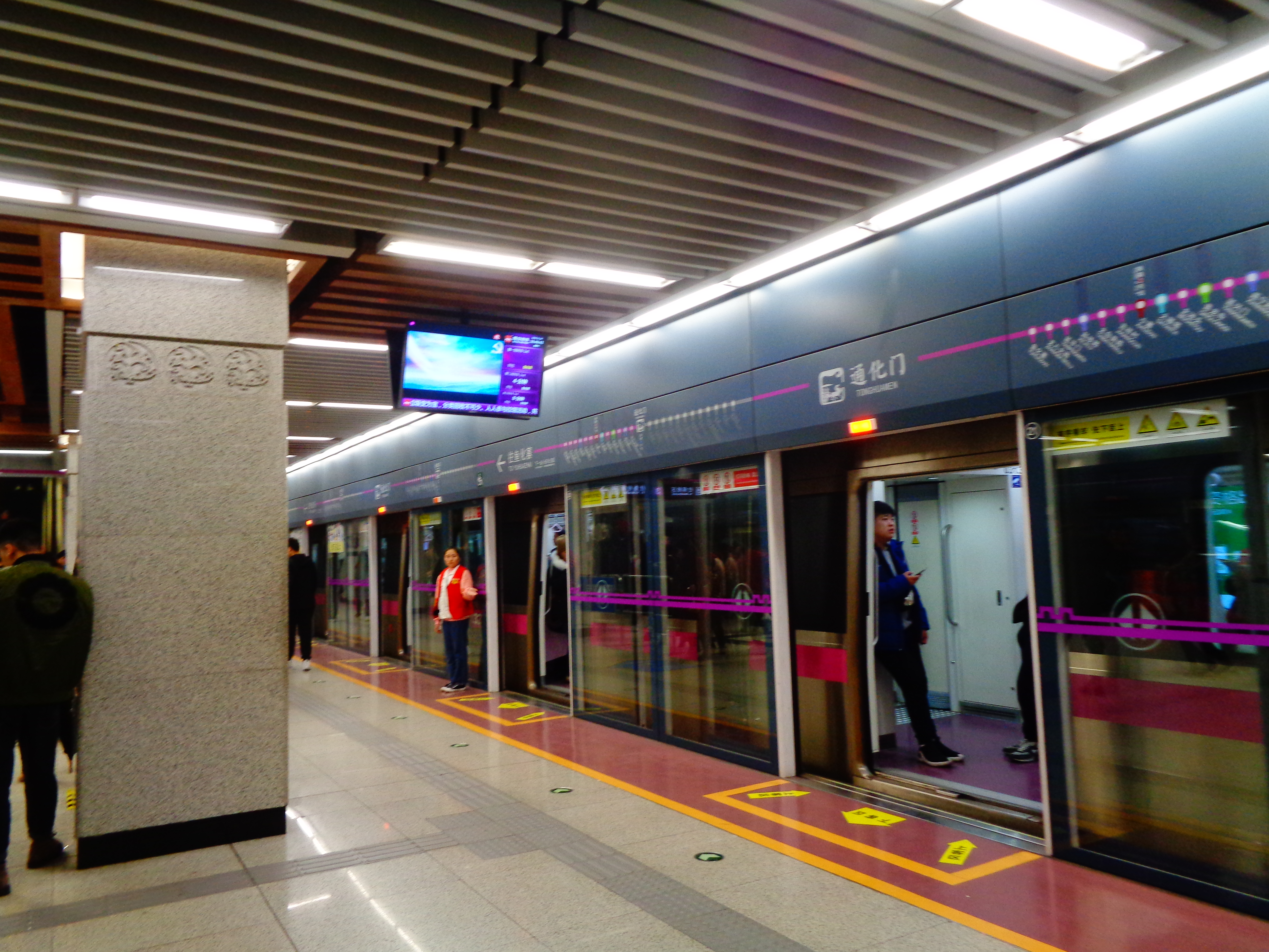 西安地铁通化门站